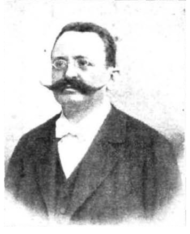 Retrato de Carlos María Cortezo